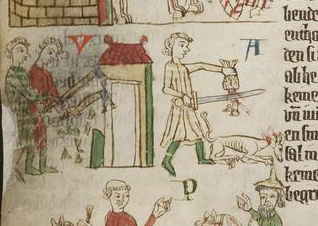 Abriss des Hauses, in dem eine Frau vergewaltigt wurde und Tötung der bei der Tat anwesenden Tiere wegen „unterlassener Hilfeleistung“. Illustration aus dem Heidelberger Sachsenspiegel